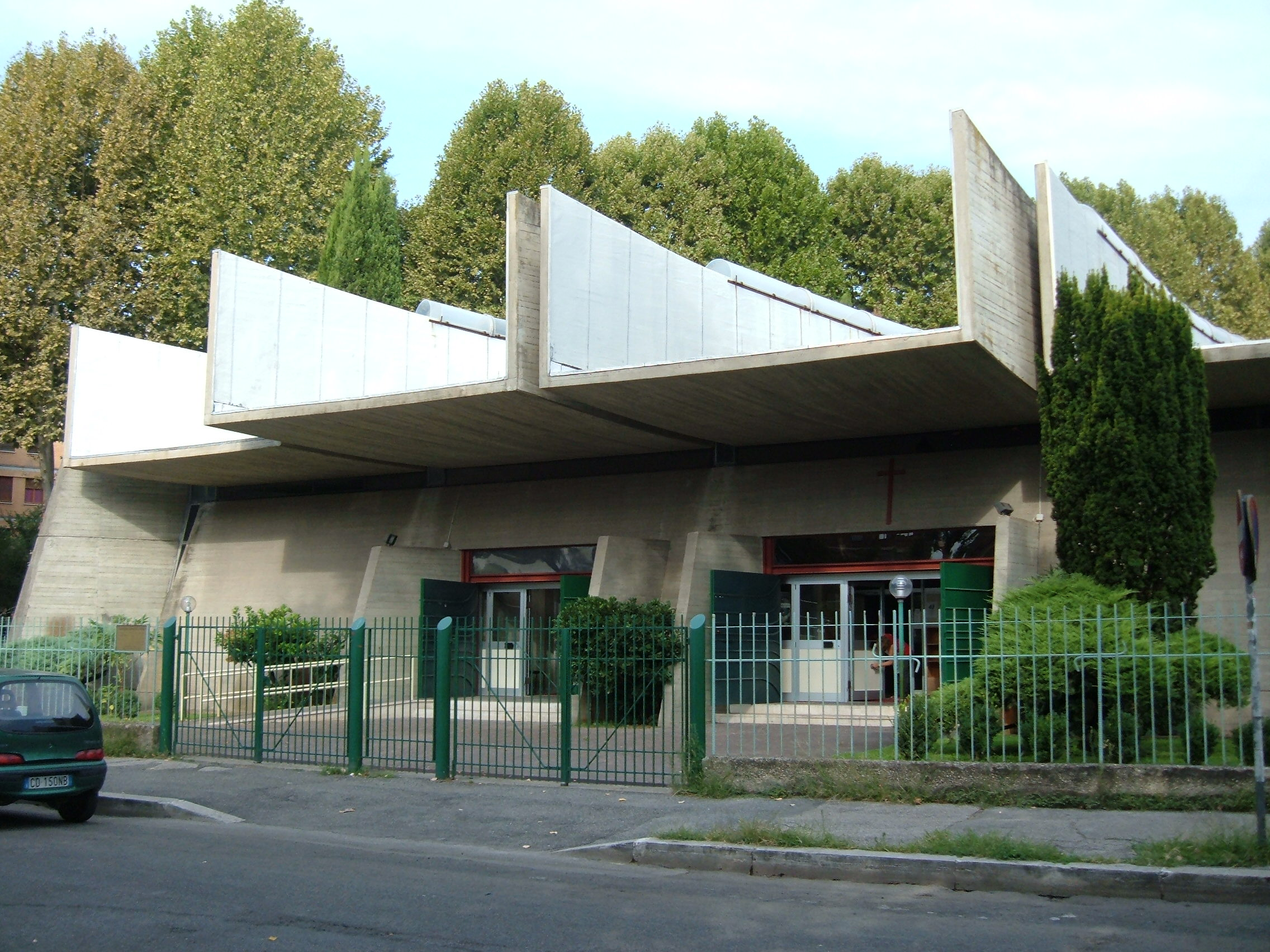 Chiesa di San Mattia, a Roma, nel quartiere Monte Sacro Alto, in via Corrado Alvaro.